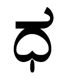 дхакараву